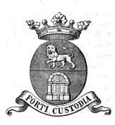 Wappen der französisch-bayerischen Grafen von Saporta